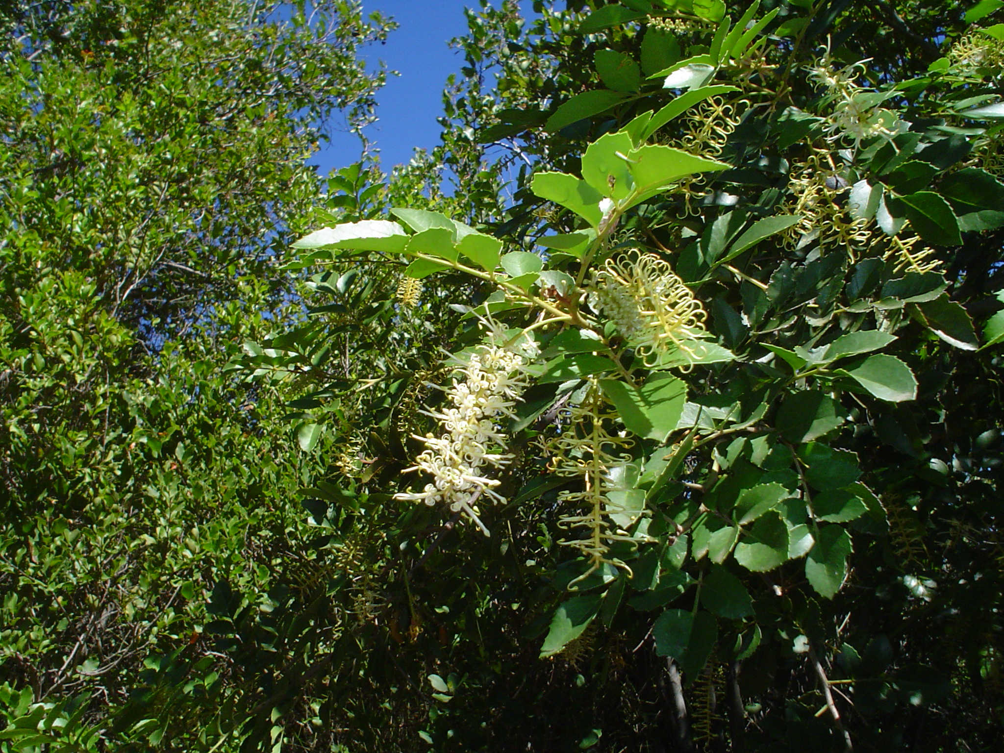 Flor de avellano (Gevuina avellana). San Fabián de Alico, región del Biobío, Chile.